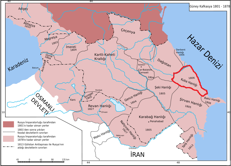 Kuba Hanlığı